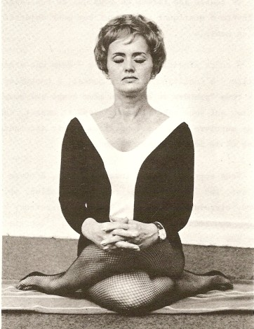 Logo du Studio Suzanne Piuze et photo de Mme Suzanne Piuze en position de yogi.